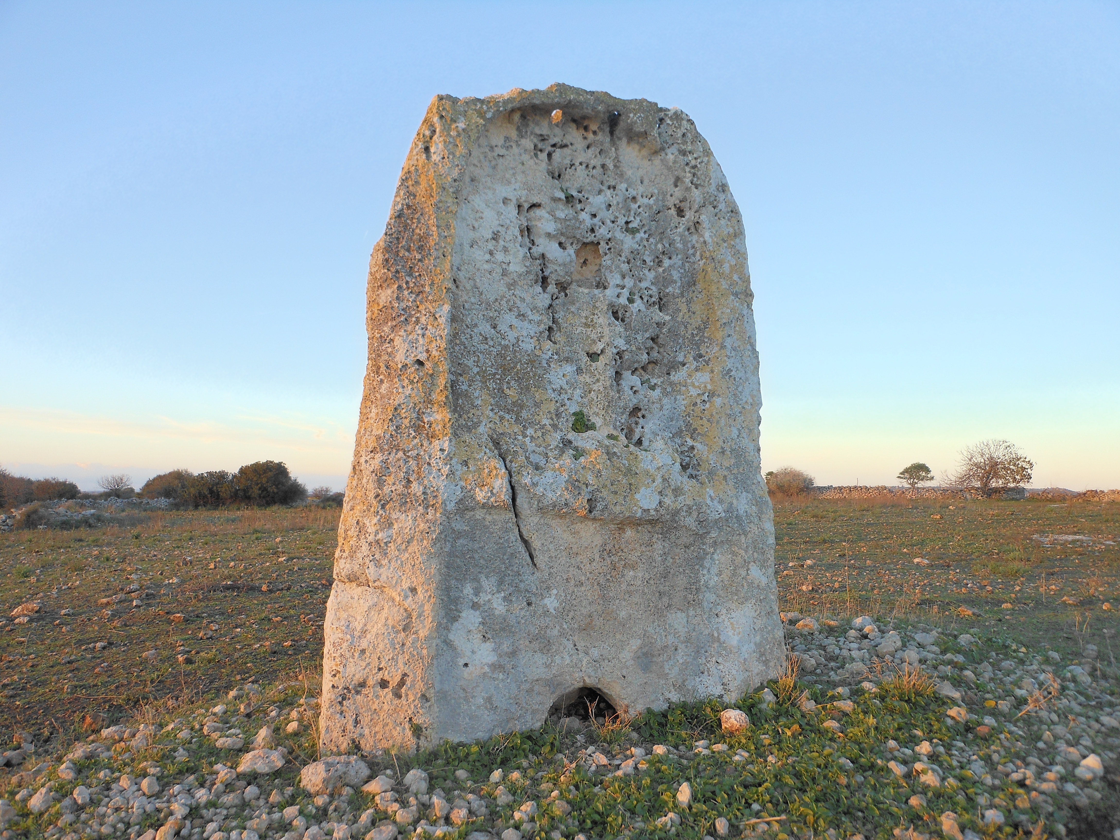 Uri, Italy - Tomba dei giganti di Sa Pedra Longa